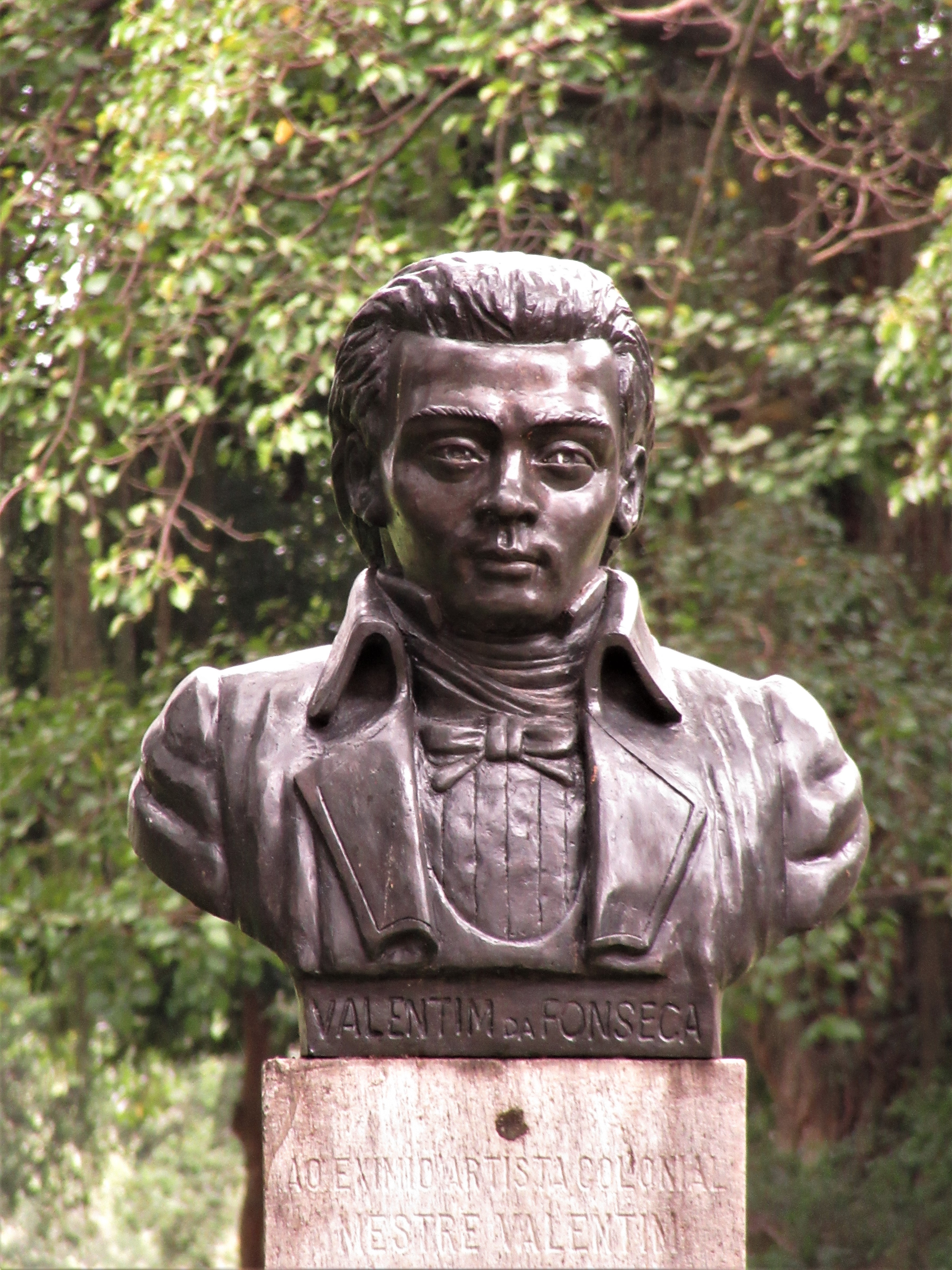 1Busto de Mestre Valentim